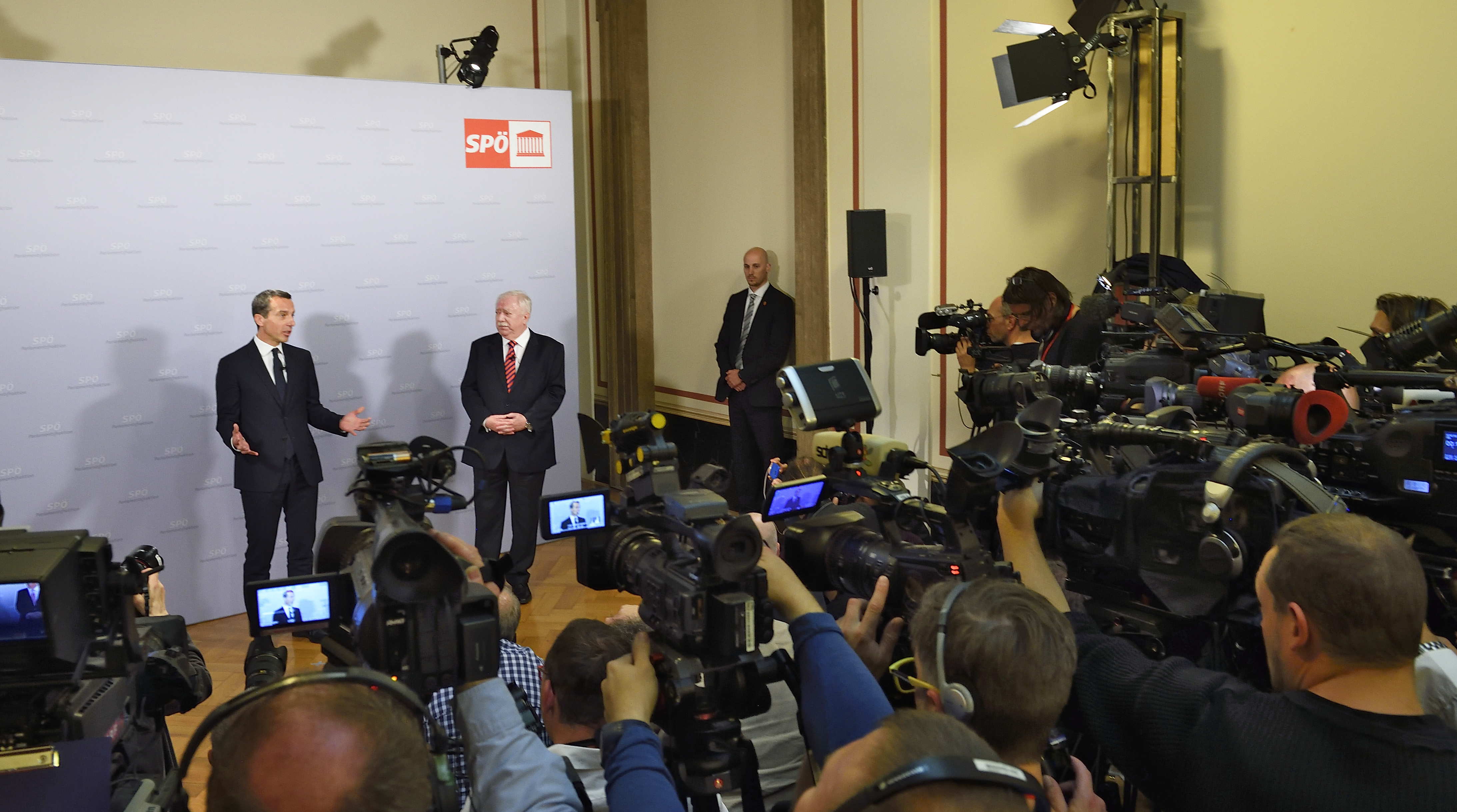 Der designierte Bundeskanzler Christian Kern bei der Pressekonferenz nach dem Parteivorstand